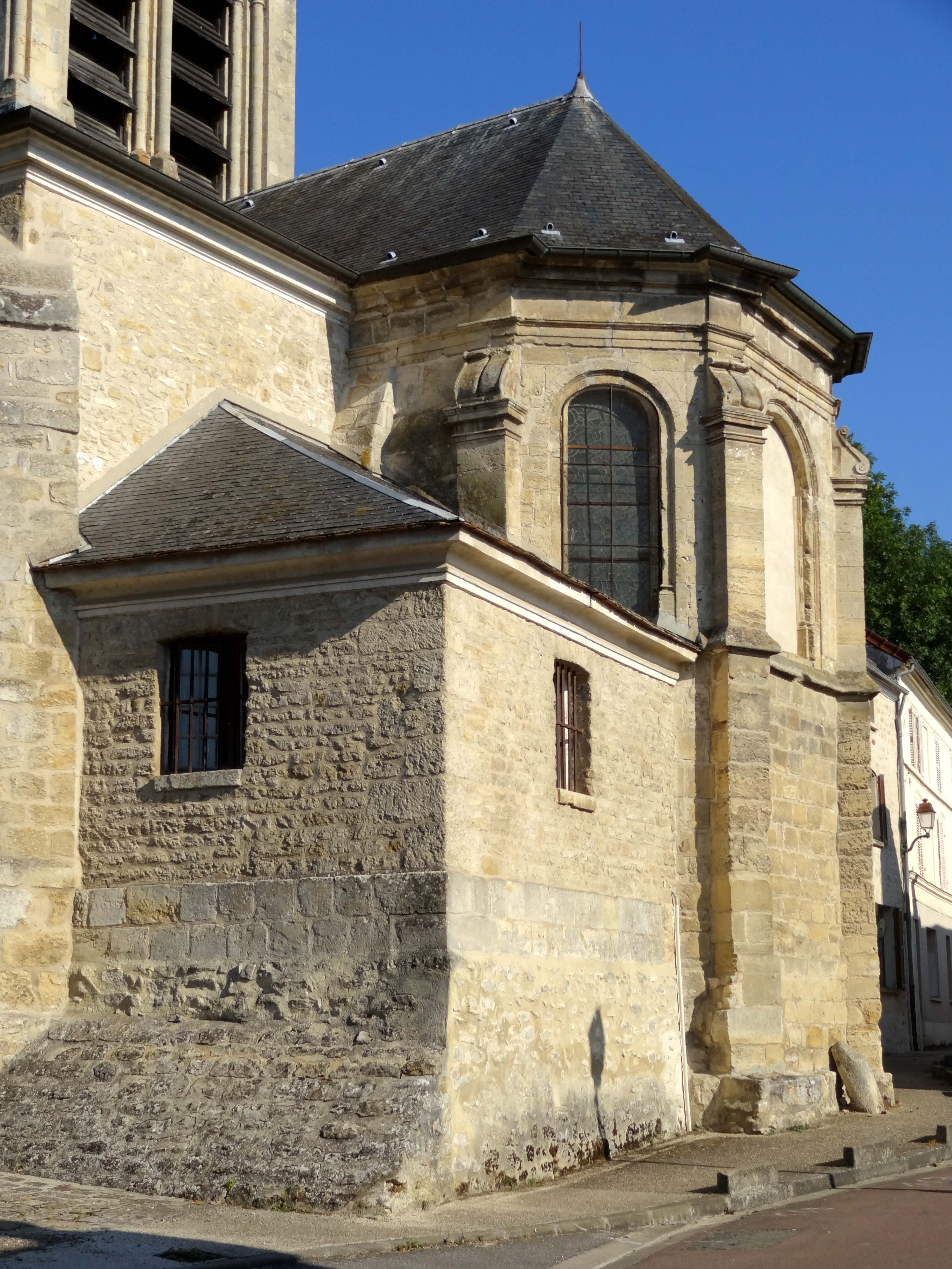 Église Saint-Séverin d'Oinville-sur-Montcient - voir titre.